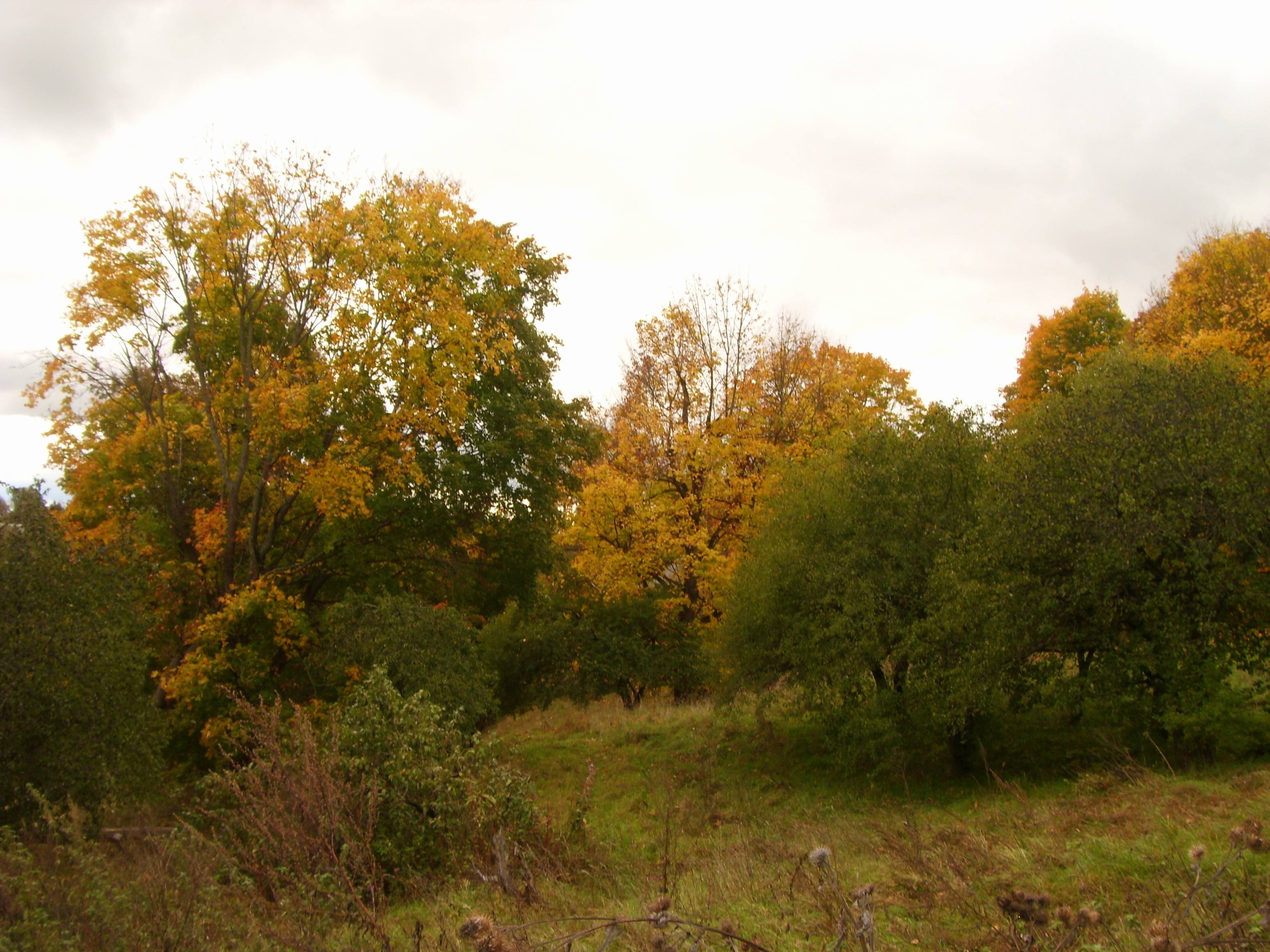 Парк «Верхний сад (Брянская область, Почеп, Ново-Затинная улица)